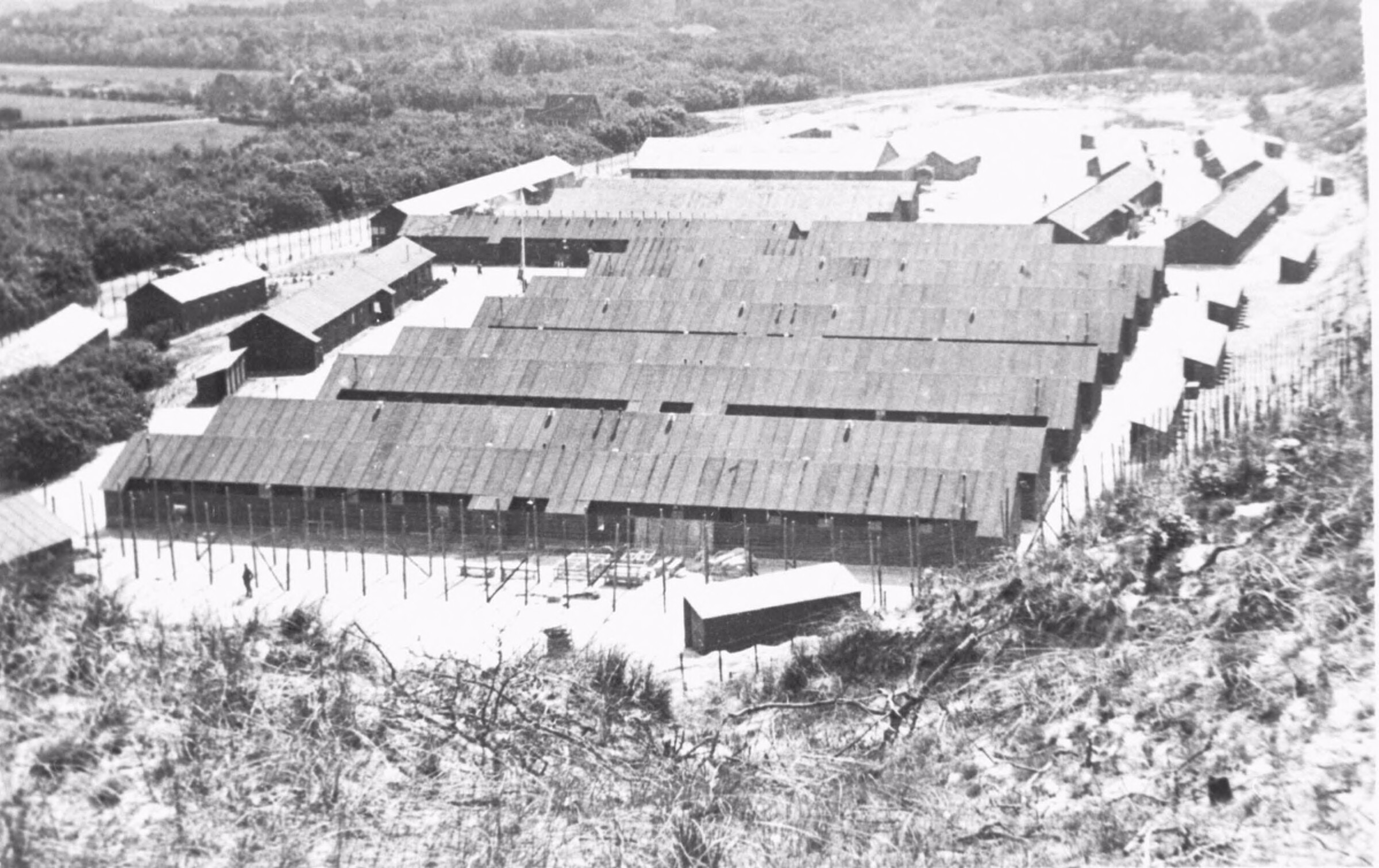 Kamp Schoorl